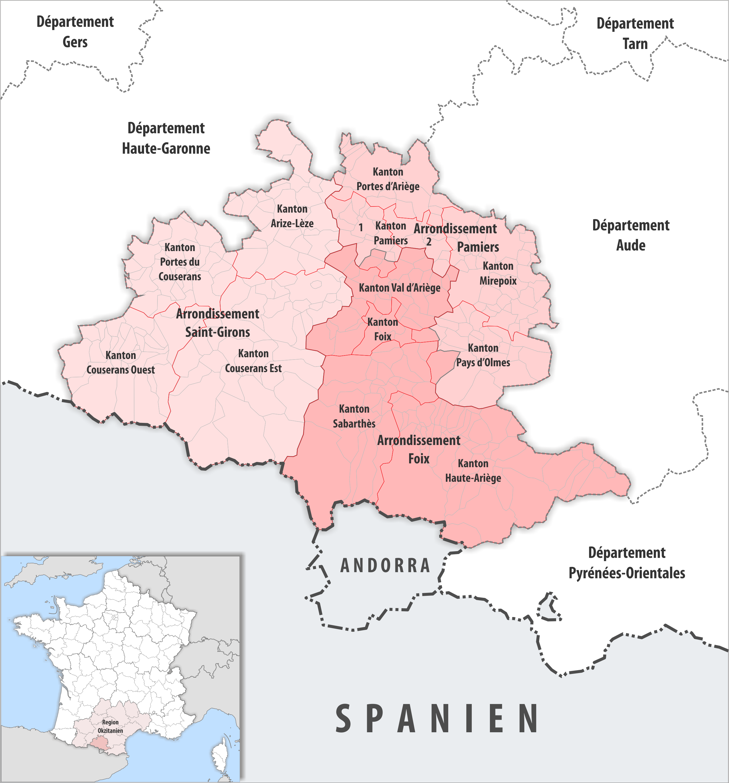 Gemeinden, Kantone und Arrondissemente im Departement Ariège